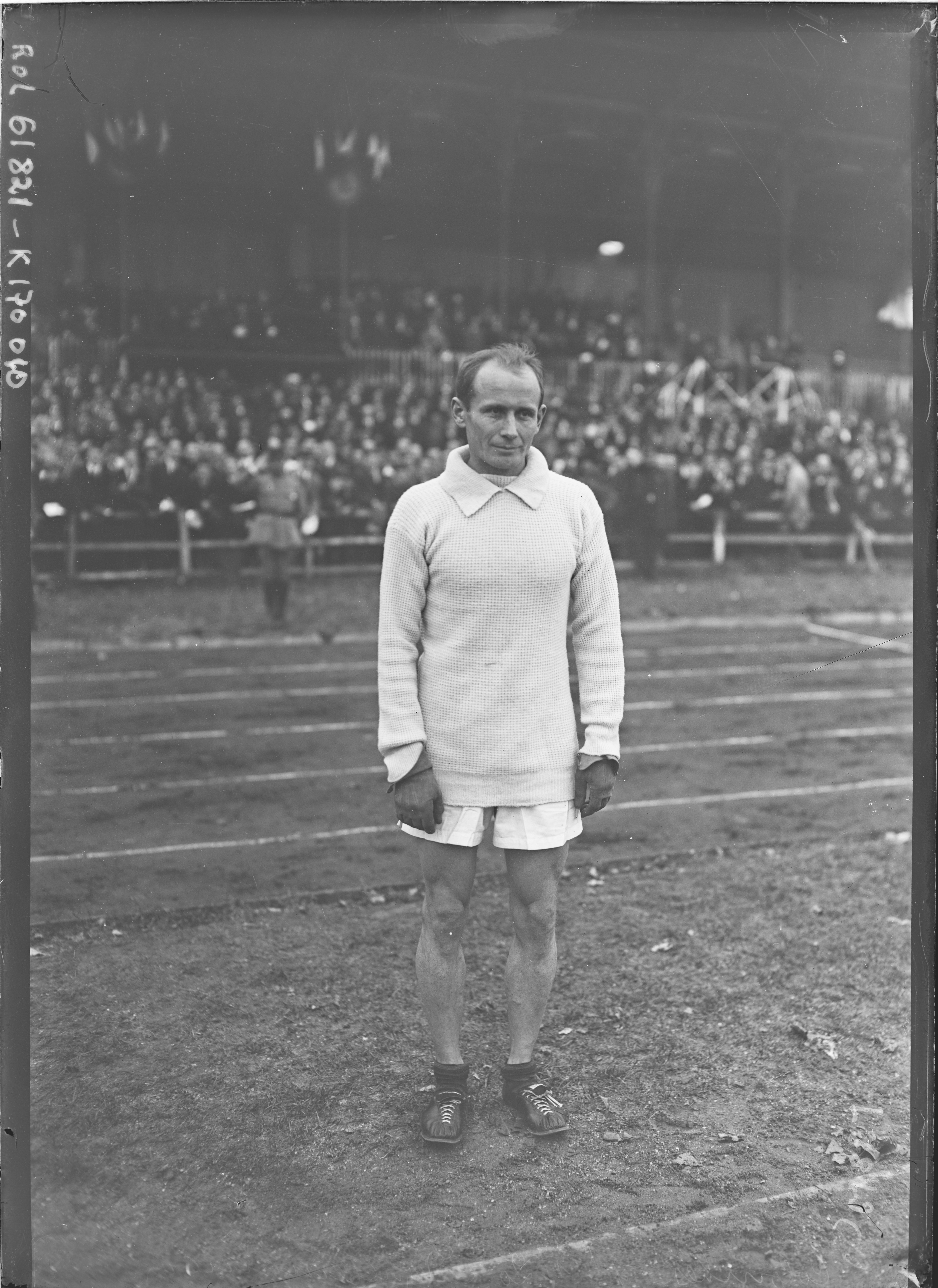 Colombes, 1/11/20, Hannes Kolehmainen [coureur à pied].